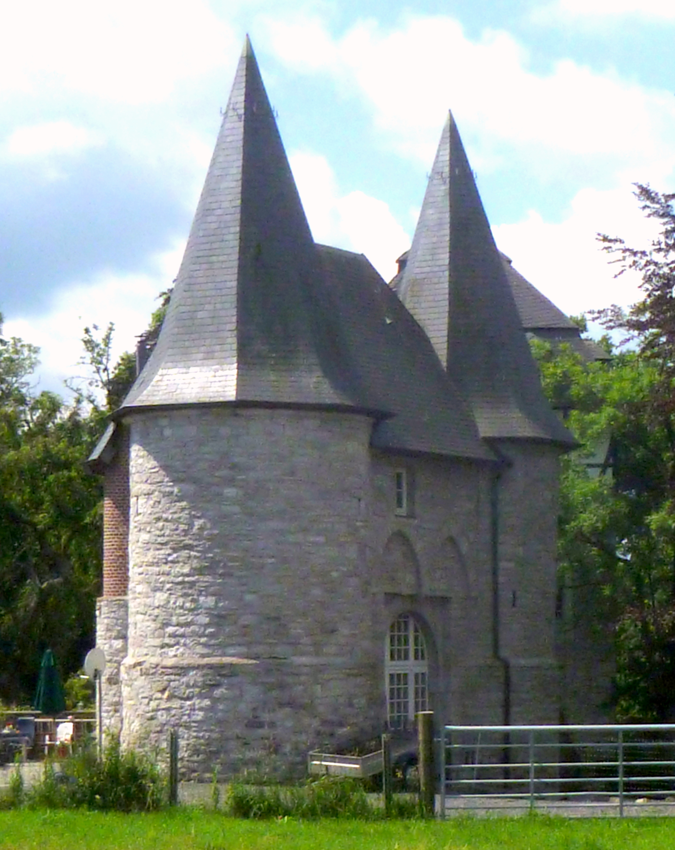 Vorburg von Schloss Libermé in Kettenis/Belgien; Baudenkmal